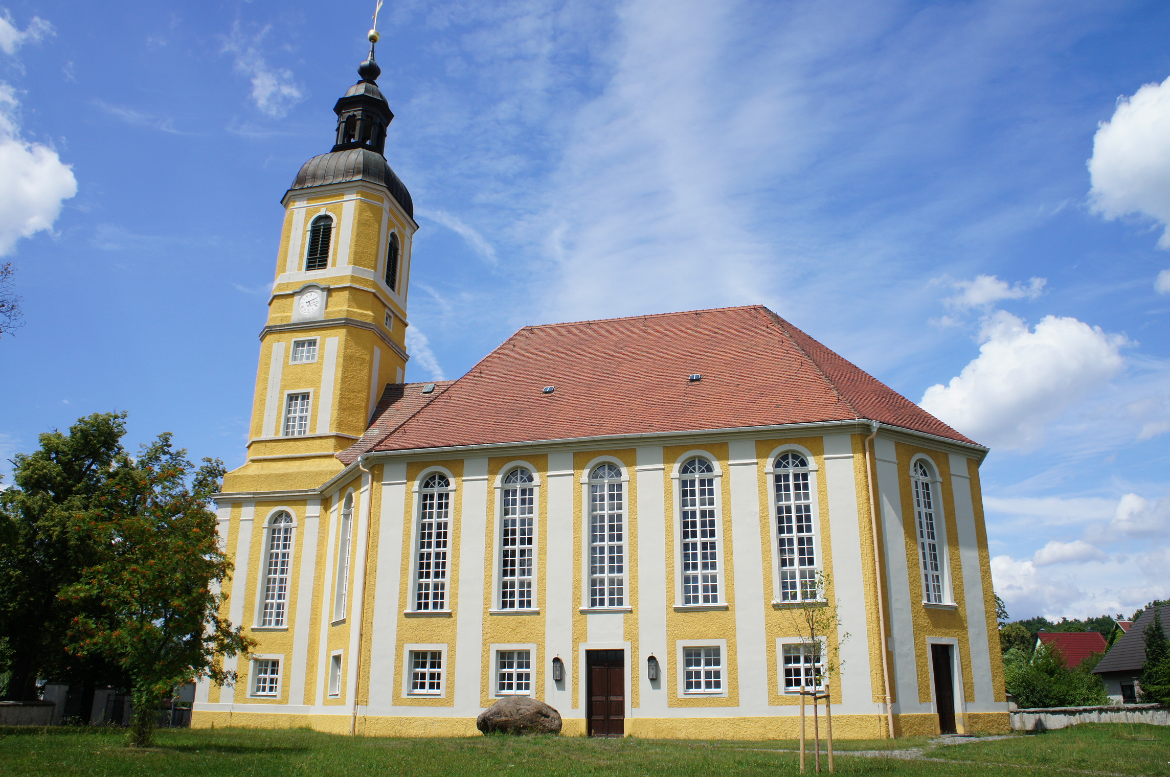 Evangelisch-Lutherische Kirche in Oßling. Erbaut von 1803-1805. Abriss der alten Kirche 1805 (1410 geweiht), aus den Steinen wurde der Turm der neuen Kirche gebaut. Die alten Glocken klangen zur Kirchweihe 1805 vom neuen Turm.